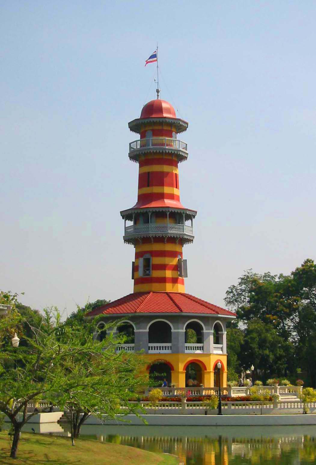 Bang Pa-In lookout tower in Ayutthaya, Thailand